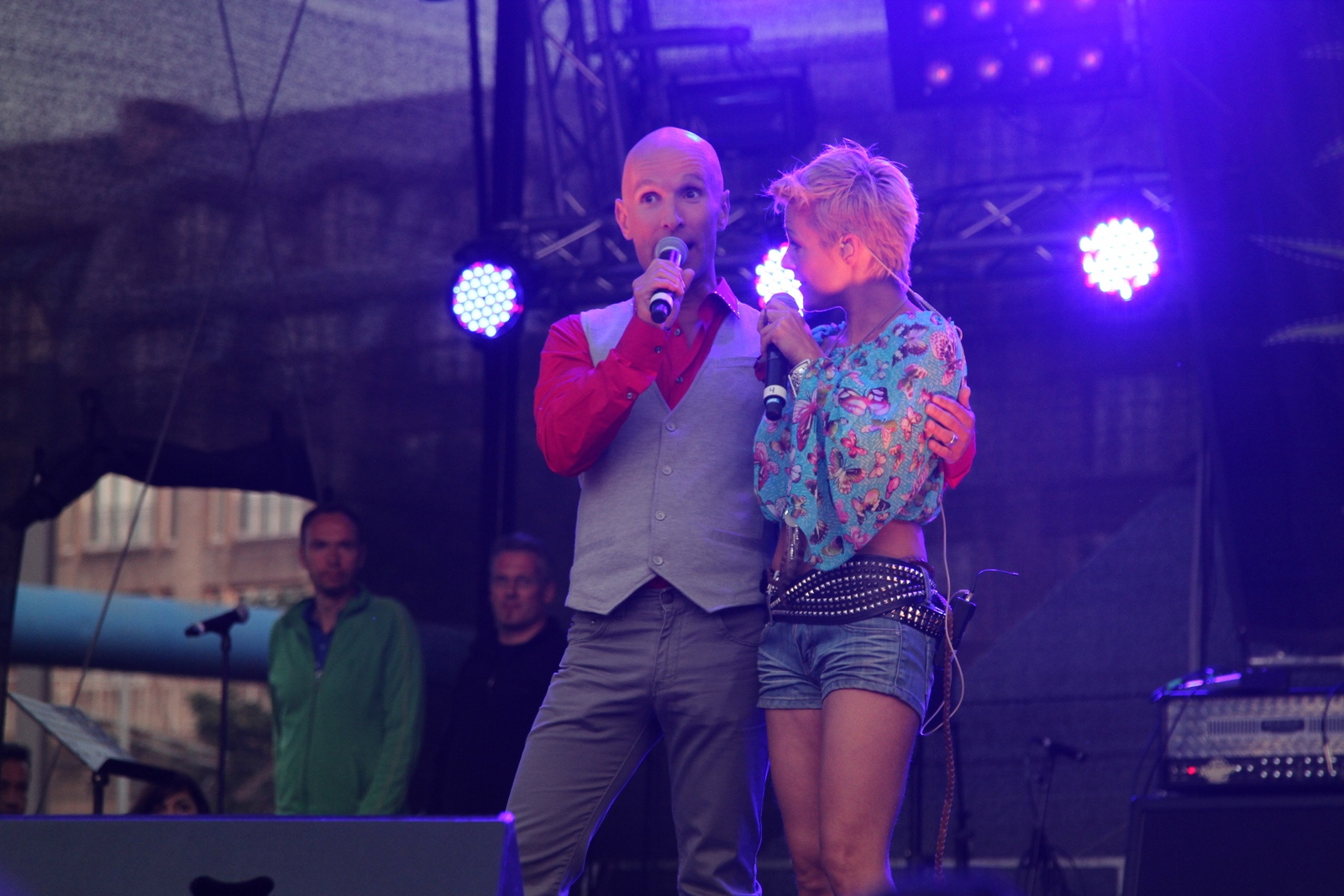 Michael Begasse mit Michelle beim WDR 4 Schlagerstündchen am 9. Juli 2011